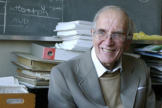 Paul Wild, ehemaliger Astronom an der UNI Bern